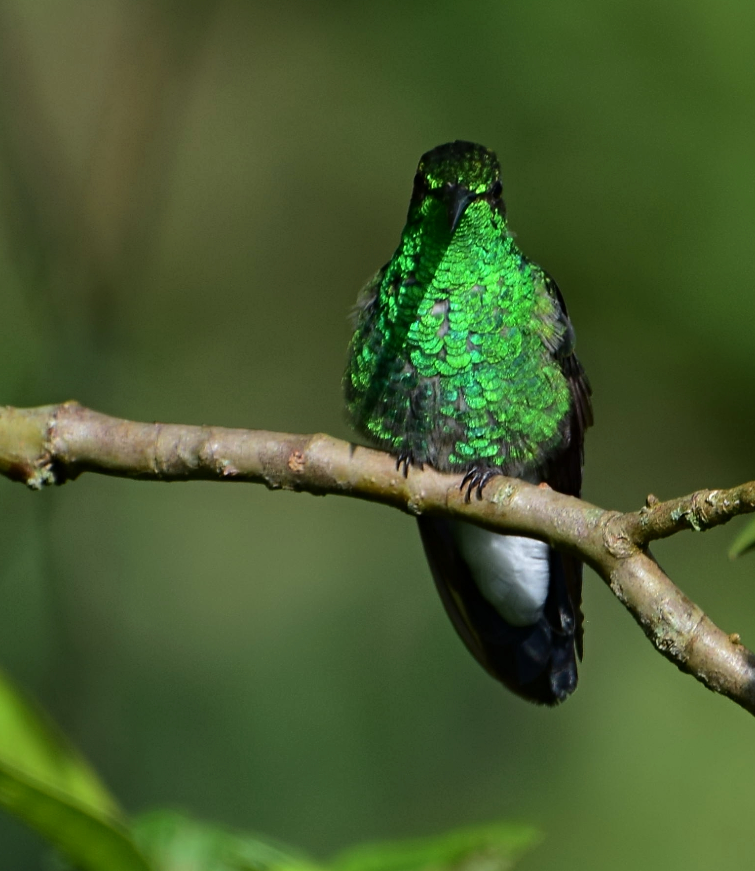 Chalybura buffonii (Colibrí de Buffon)